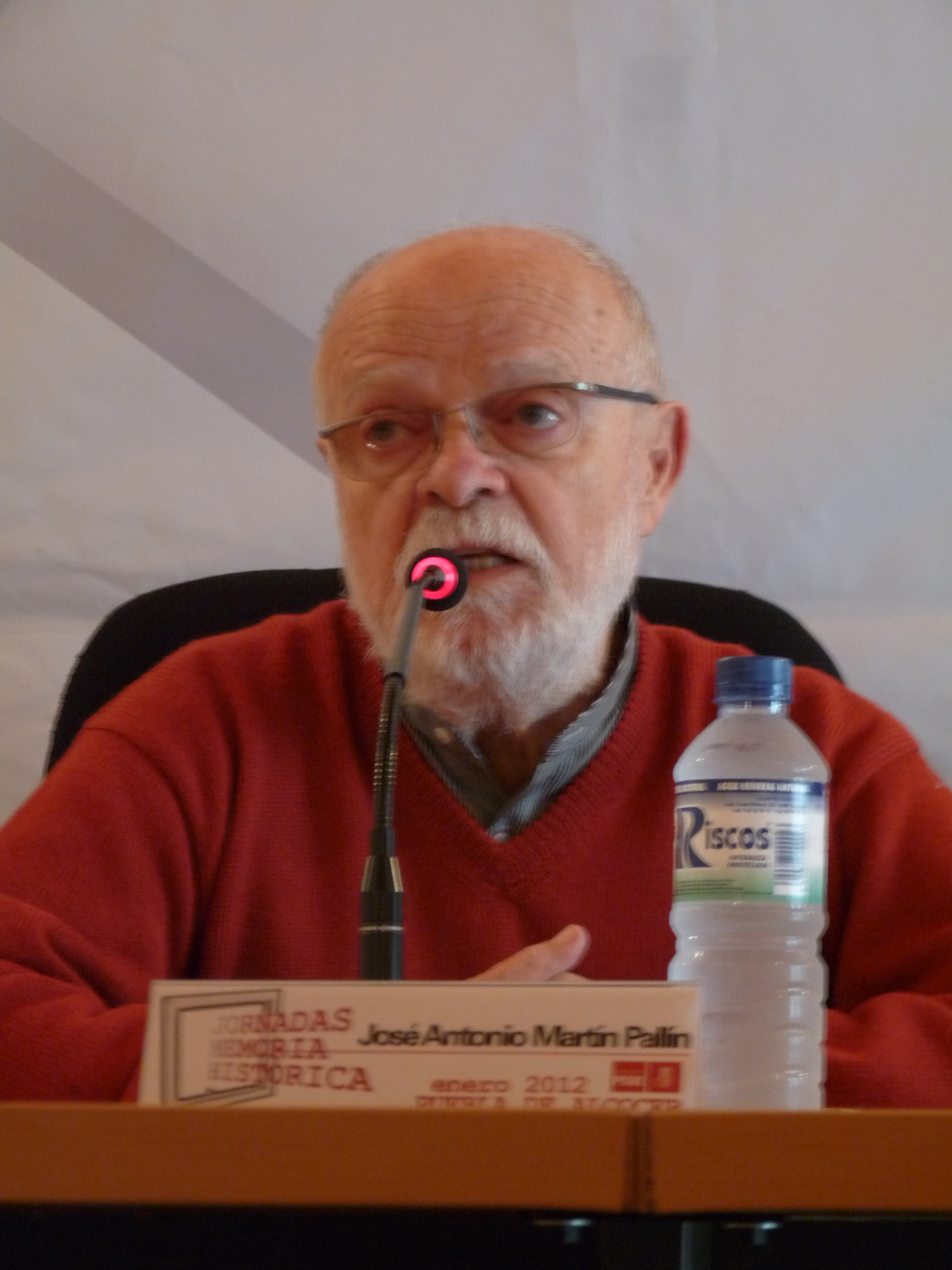 José Antonio Martín Pallín en las III Jornadas Regionales sobre Memoria Histórica